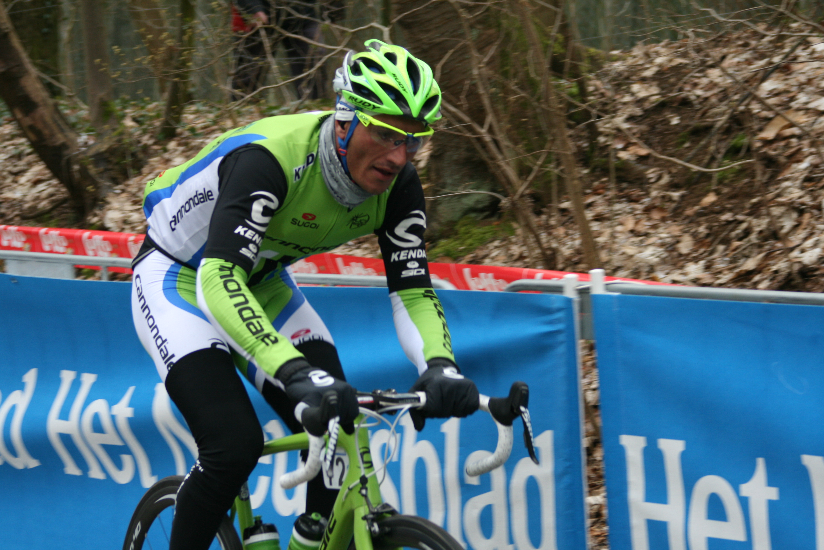 Gent-Wevelgem 2013, Kemmelberg